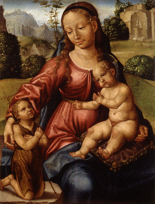 La obra representa a la Virgen María llevando en brazos a su hijo, el Niño Jesús, y acompañada por el pequeño San Juan Bautista.